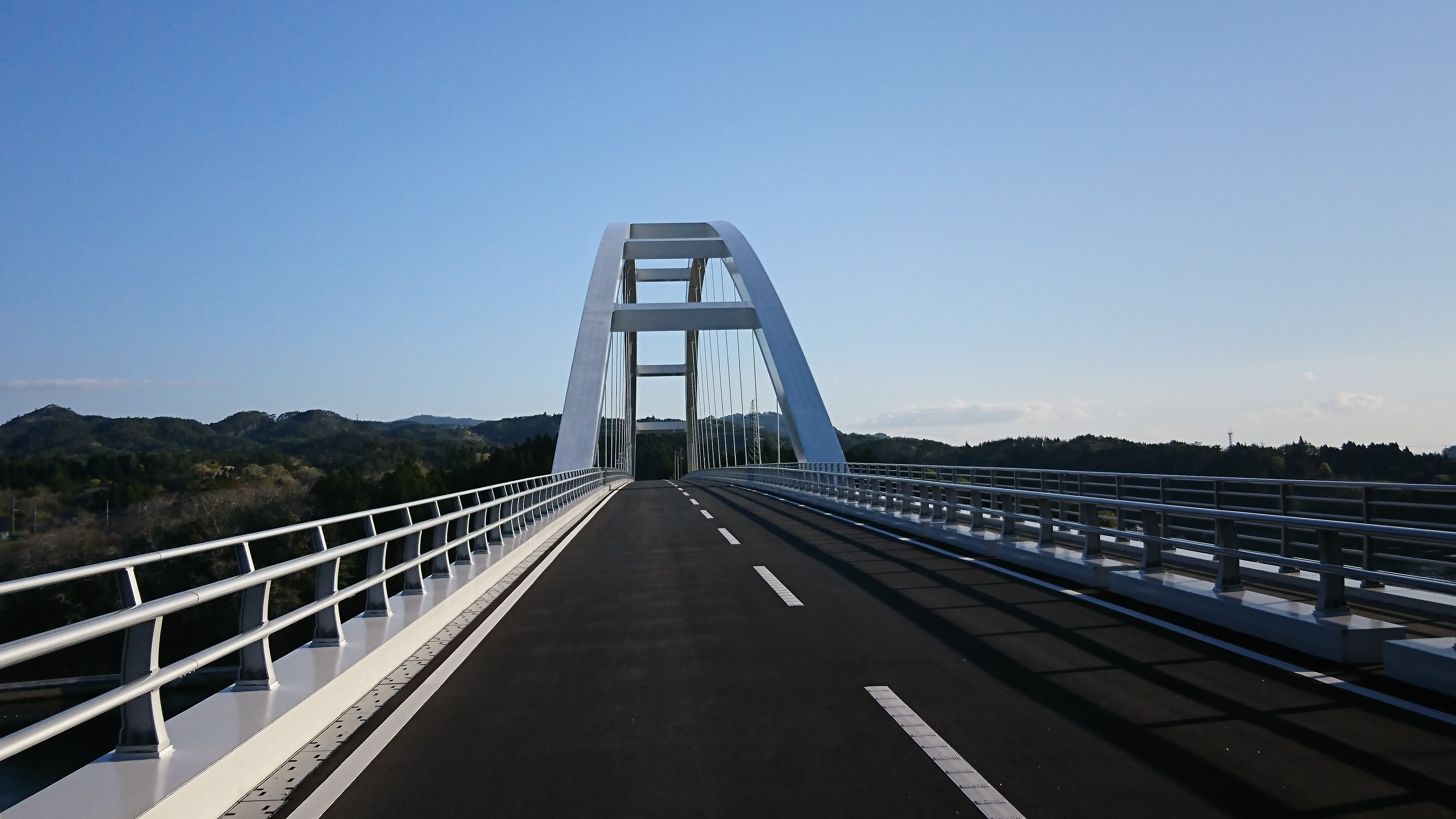 気仙沼大島側から見た橋梁